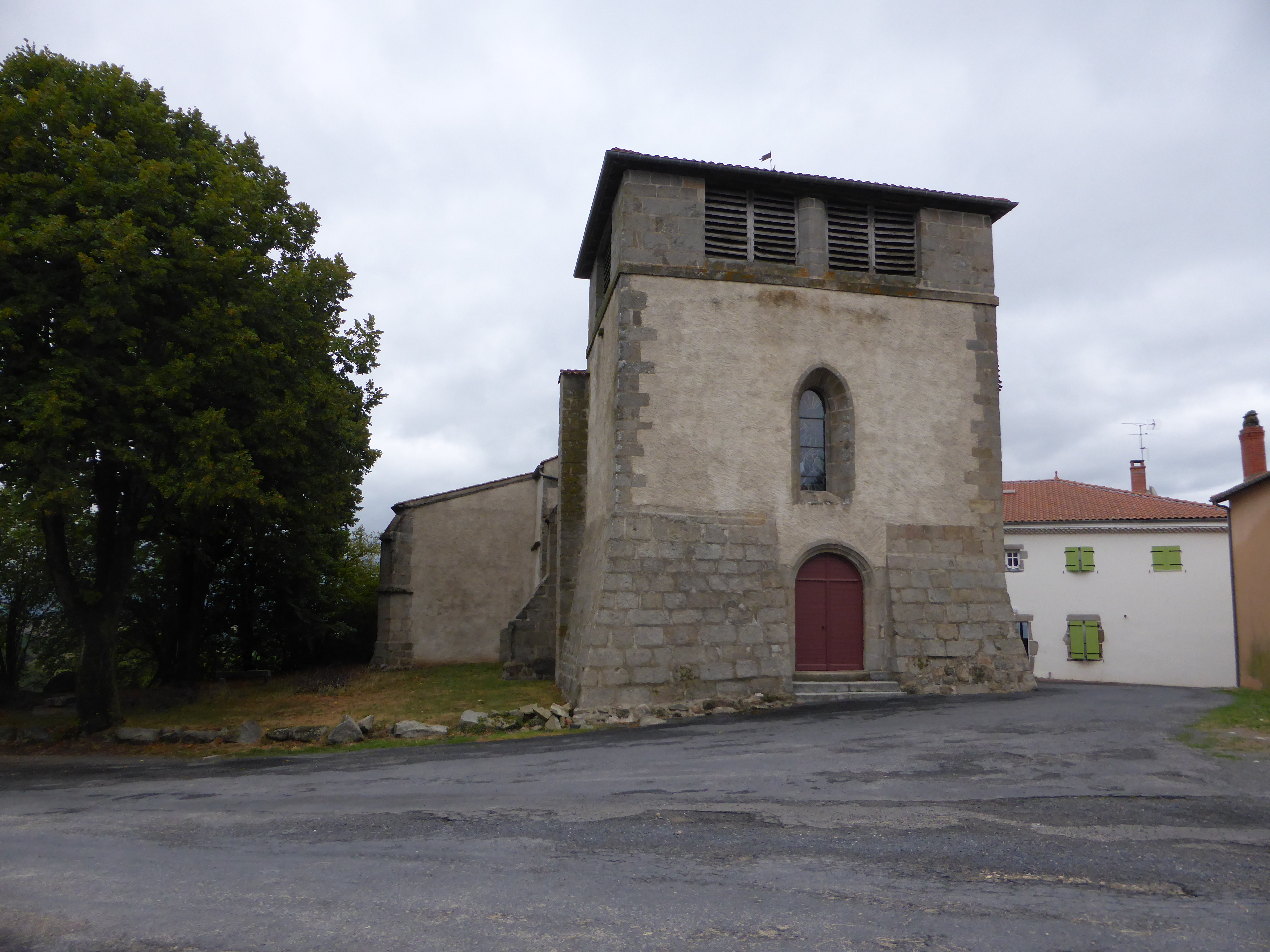 Église Saint-Barthélemy de Fayet-le-Château, dans le Puy-de-Dôme.